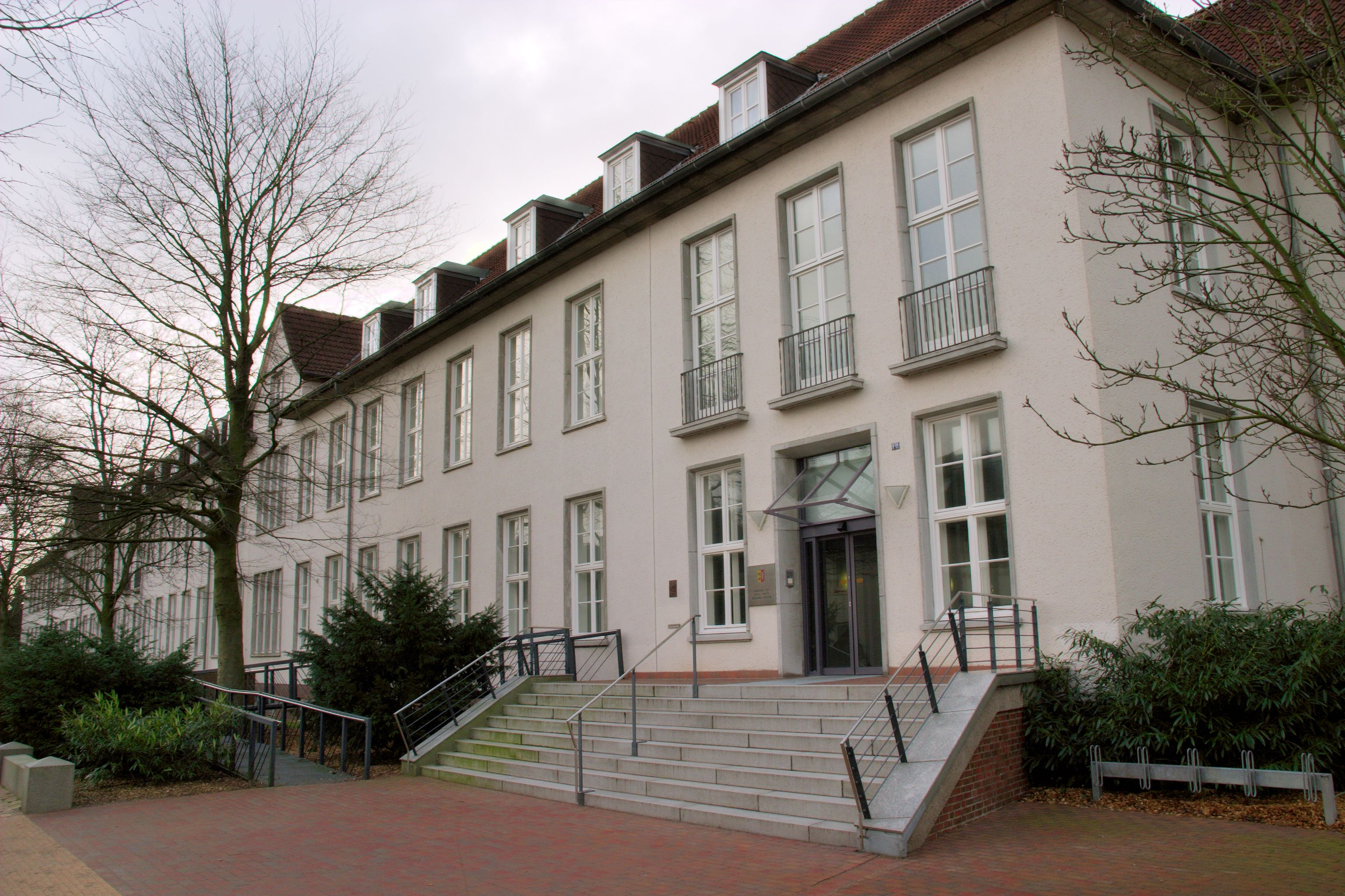 Landesamt fuer soziale Dienste, Zentrale, Neumuenster, Schleswig-Holstein, Germany